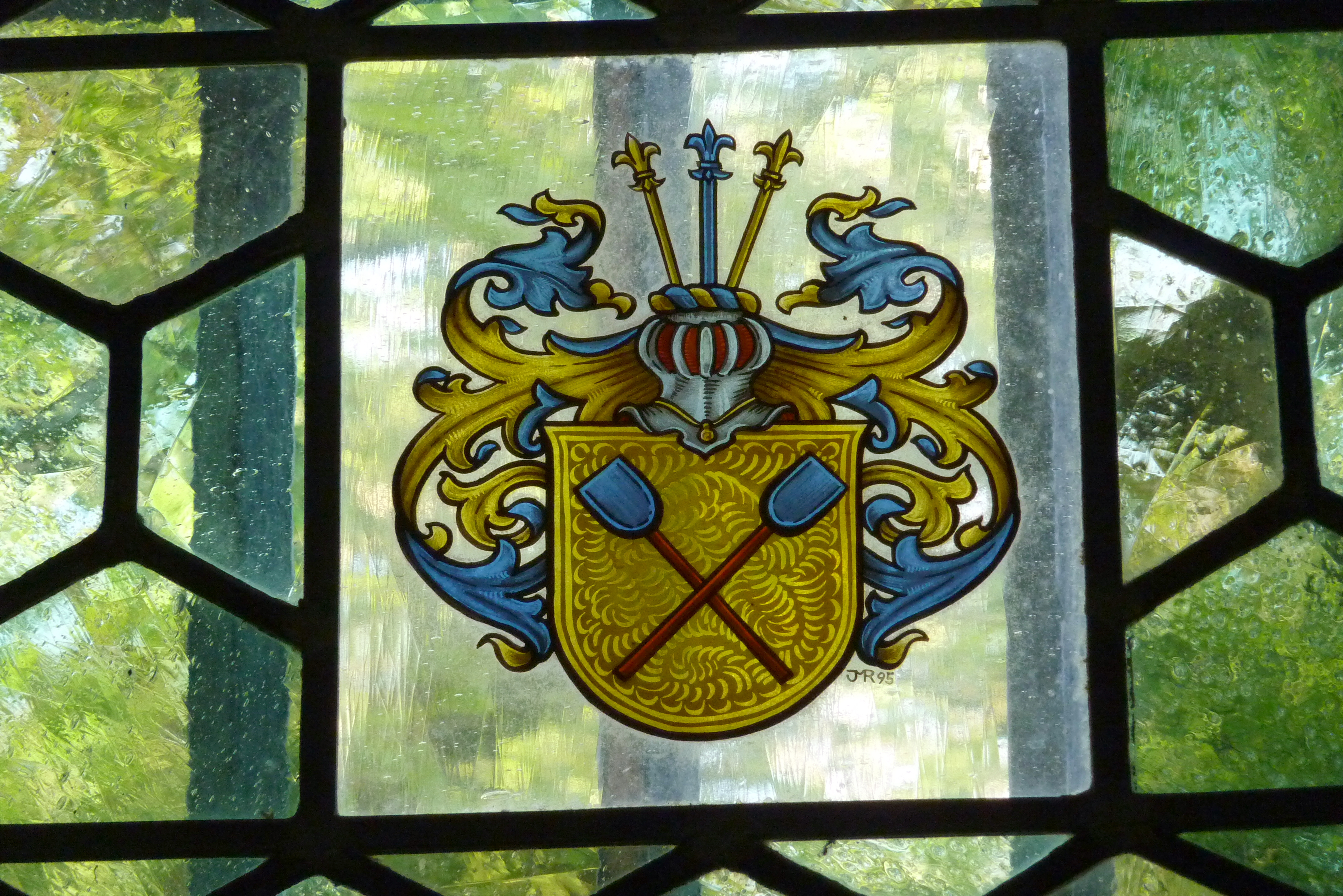 Bleiglasfenster in der katholischen Kapelle St. Antonius Eremit in Kreuzberg, einem Ortsteil von Altenahr, Wappen derer von Boeselager: Das Wappen zeigt in Gold zwei gekreuzte blaue Schaufeln mit roten Stielen. Auf dem Helm mit blau-goldener Decke befinden sich drei Lilienstäbe mit der Farbfolge gold-blau-gold